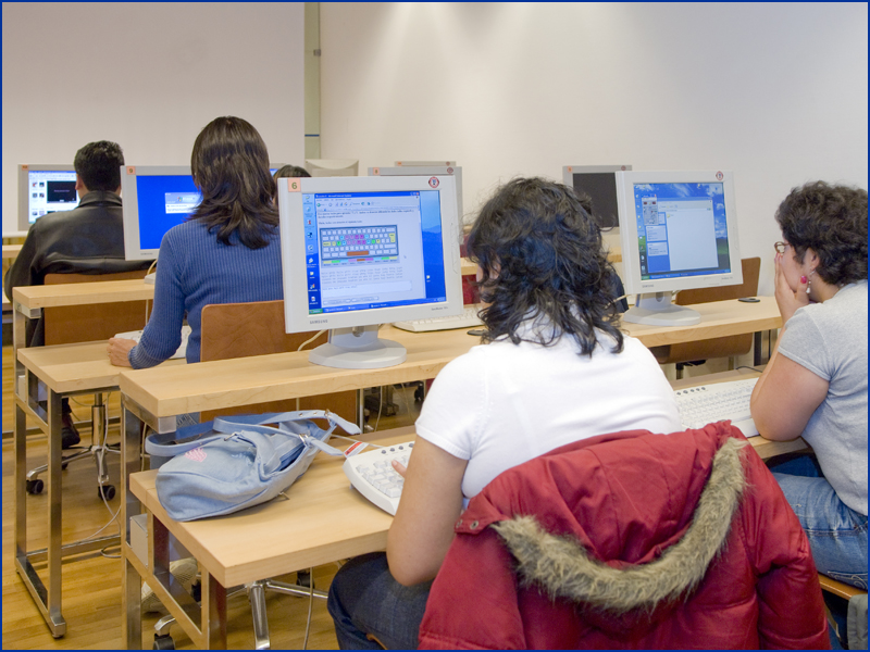 Clase de informática en el áula de formación de la Biblioteca Municipal Sagrada Familia de A Coruña, España